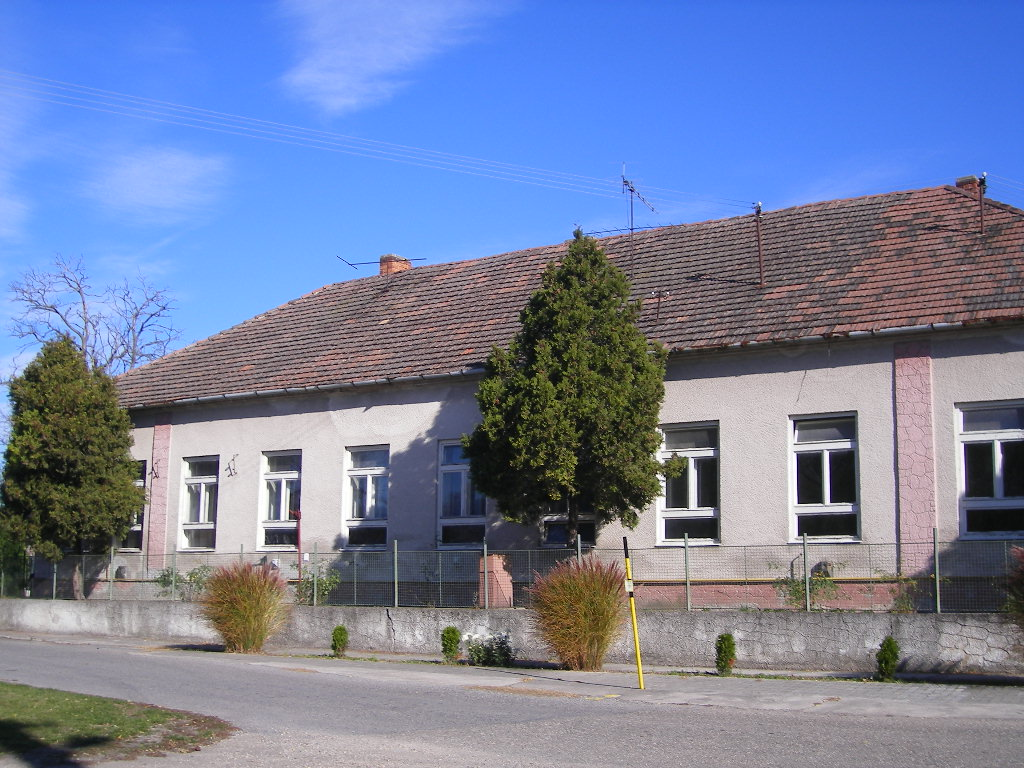 Balony - régi iskola